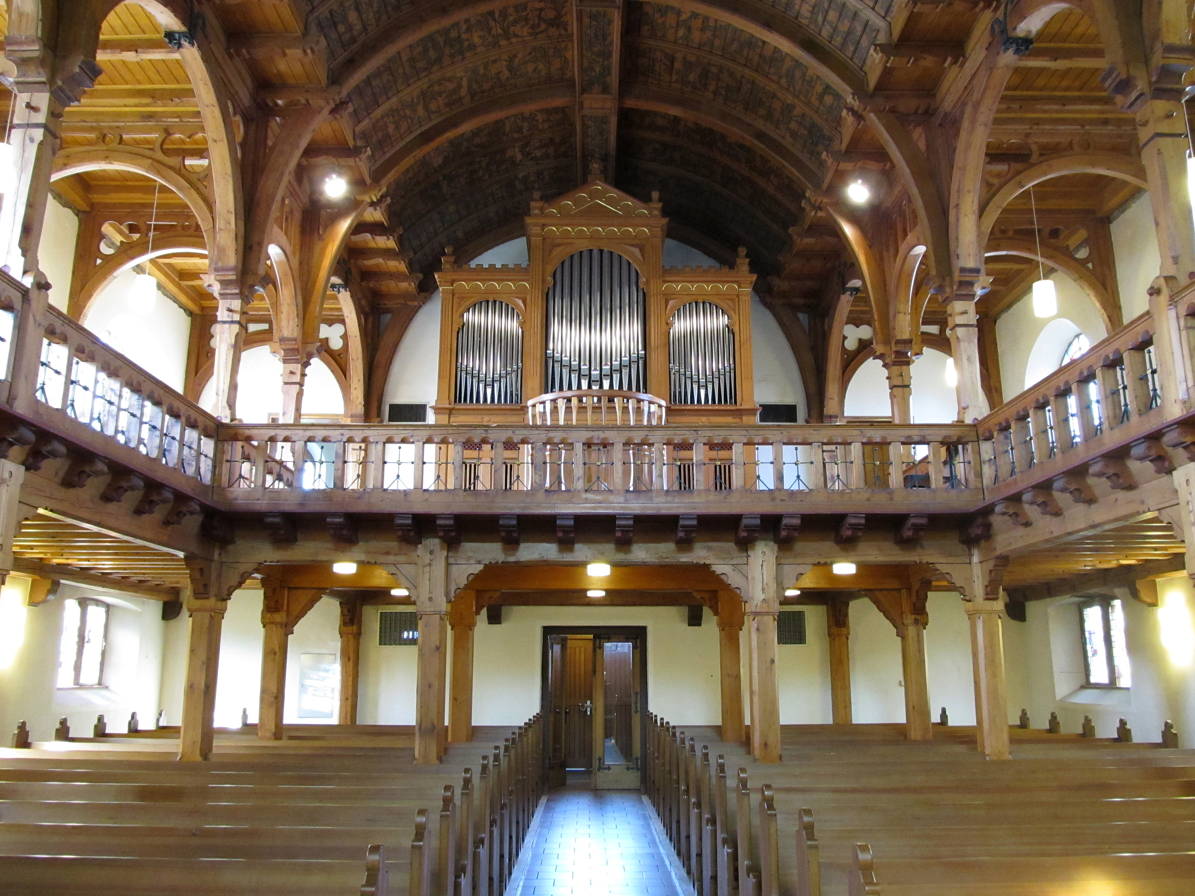 Blick ins Innere der protestantischen Kirche in Bexbach, Saarland